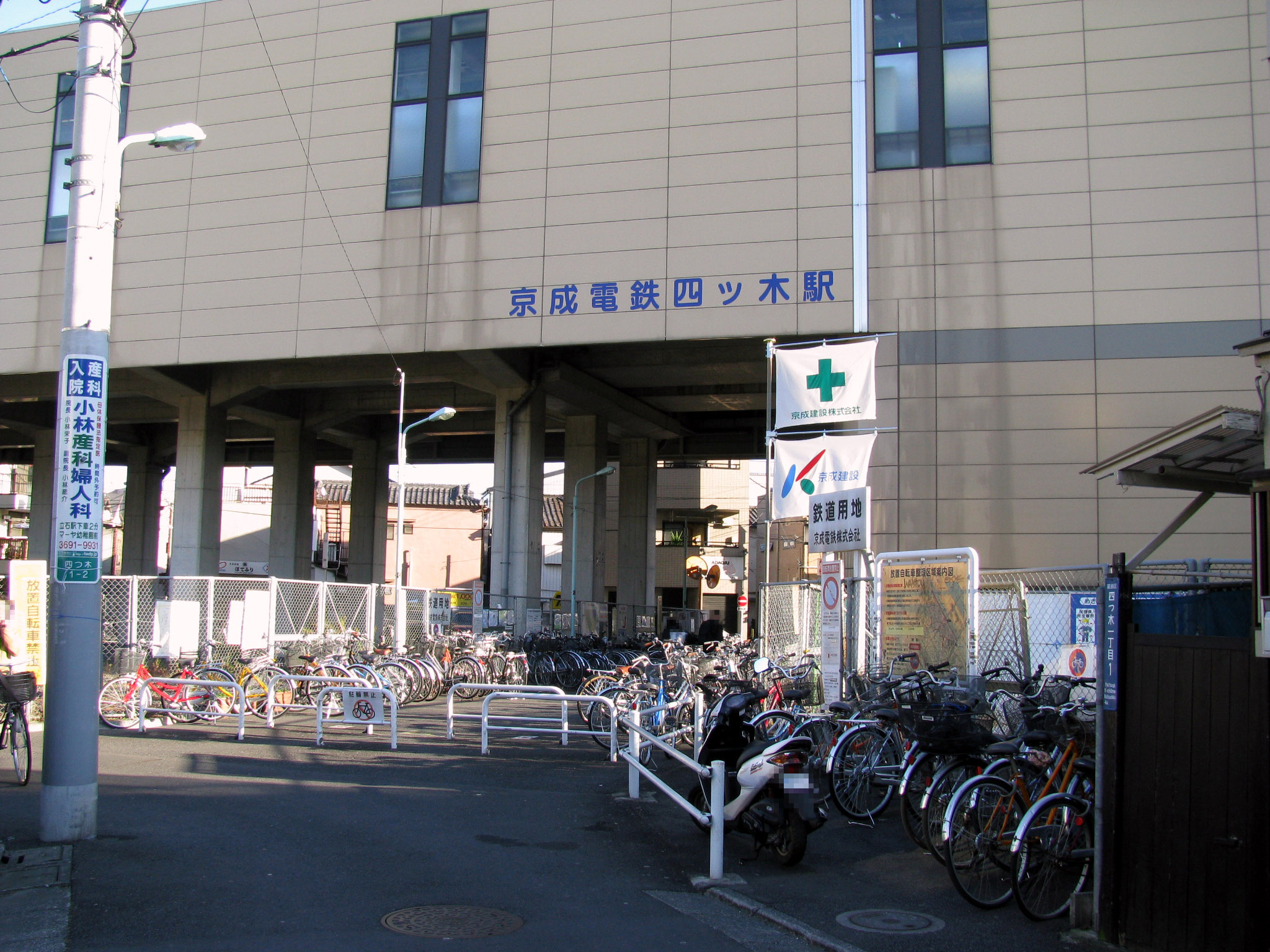 京成電鉄四ツ木駅